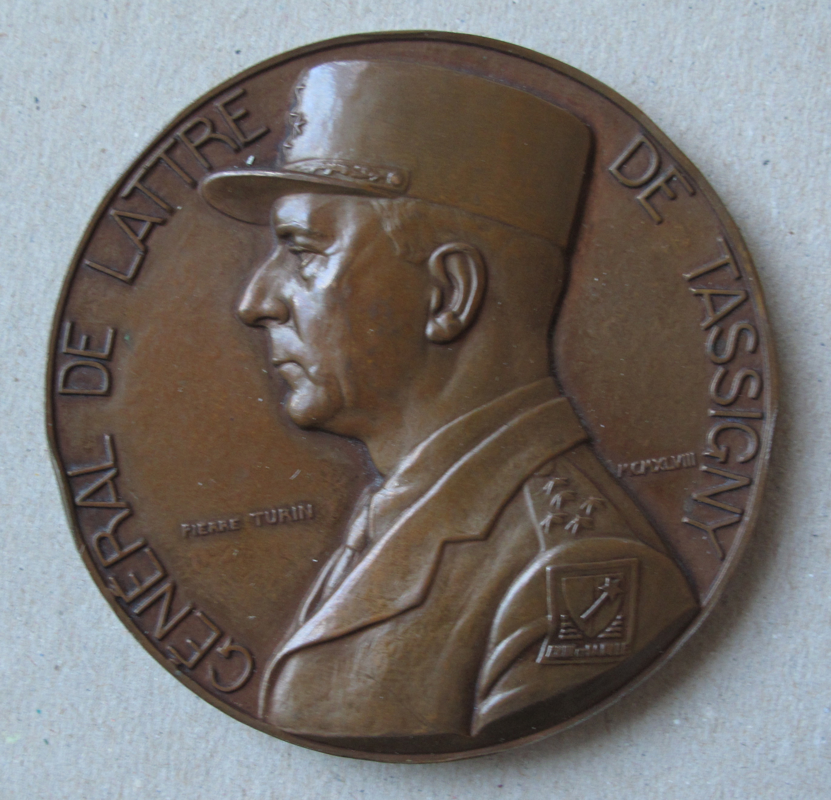 Gedenkmedaille zur Rheinüberquerung 1945 des französischen Generals de Lattre de Tassigny